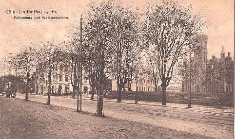 Koeln Lindenthal - ehemalige Falkenburg